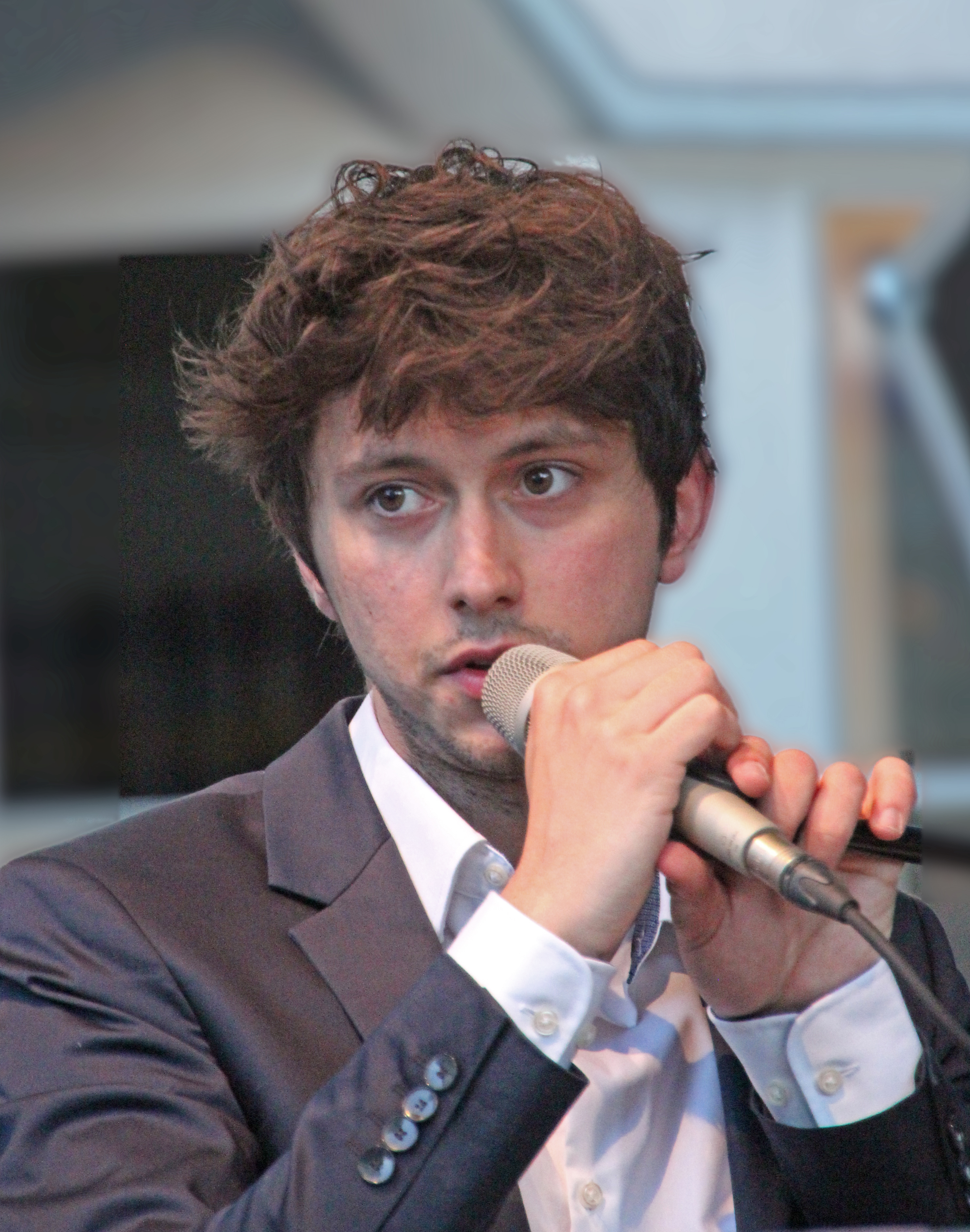 Bildinhalt: Luca Sestak bei den 22. Jazztagen Idar-Oberstein 2017. Aufnahmeort: Idar-Oberstein, Deutschland Die dargestellte Person wurde bei einem öffentlichen Auftritt fotografiert.